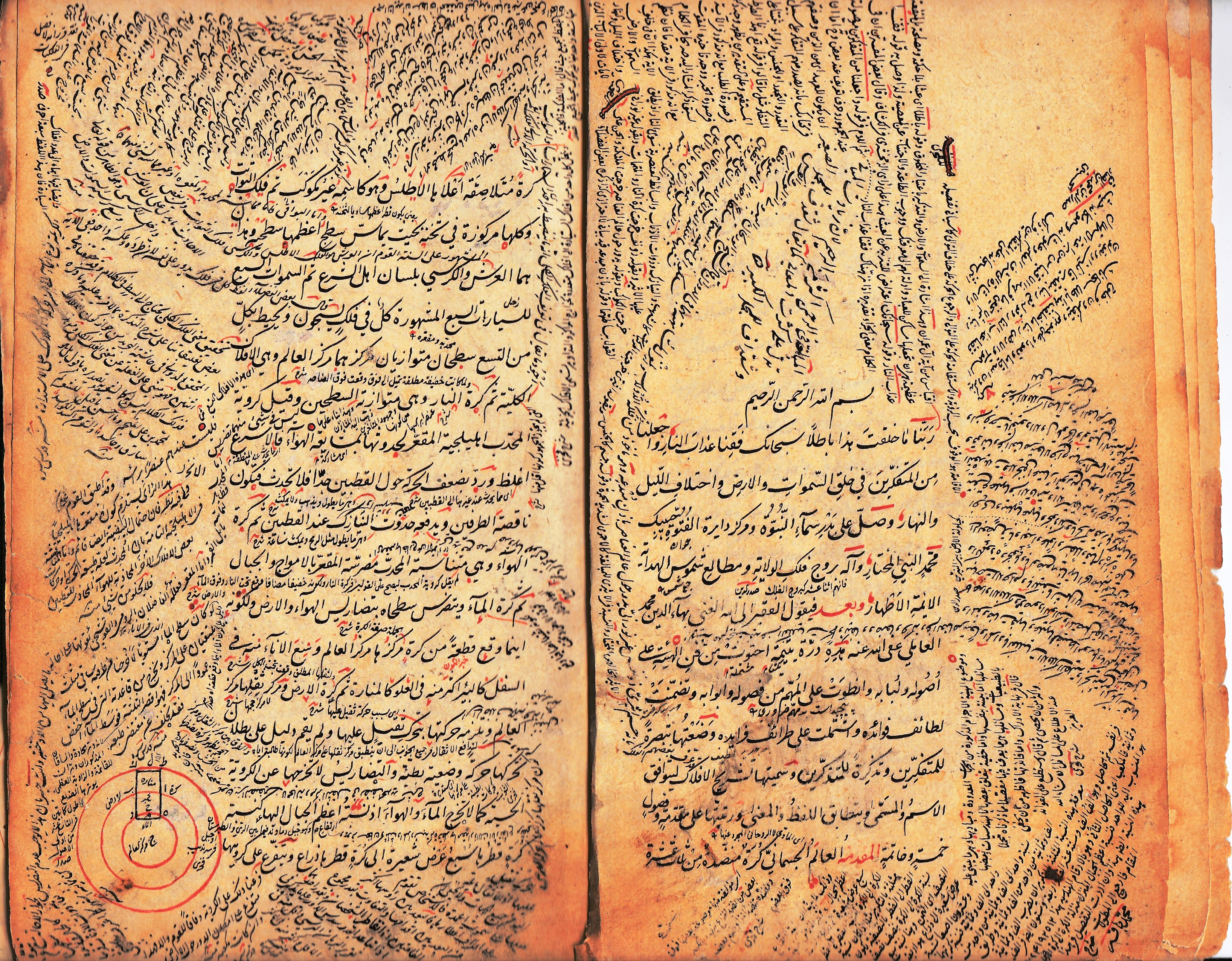 مخطوط كتاب (تشريح الأفلاك) في علم الهيئة، من تأليف بهاء الدين العاملي (المتوفى عام 1035هـ) وعلى غلاف الكتاب ختم واهداء الشيخ نعمان خير الدين الآلوسي إلى استاذهِ وشيخه ملا قاسم أفندي المفتي عام 1273هجري/ 1856م، في بغداد